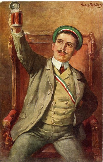 "Ein Prosit"